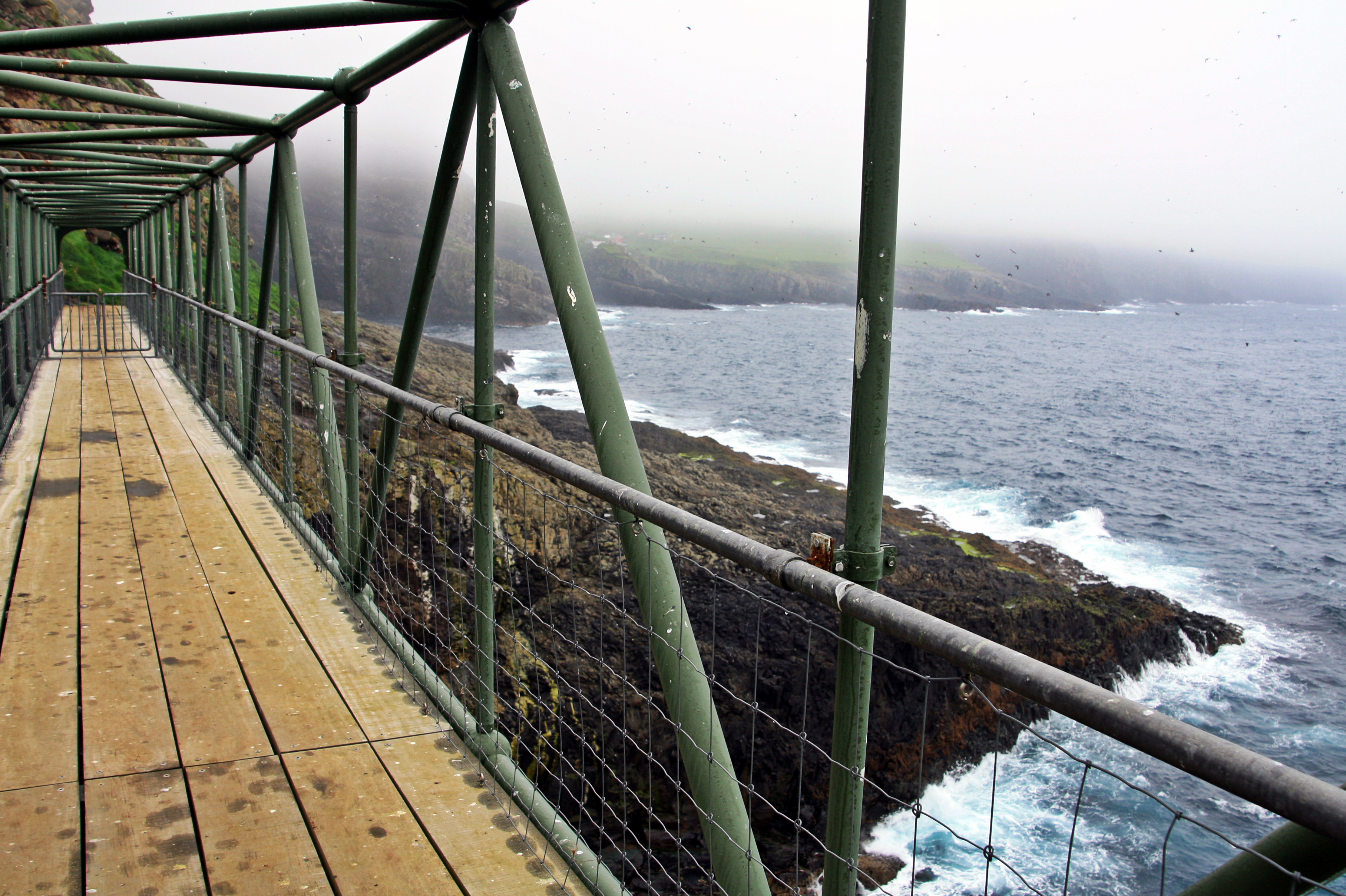 Mykines Holmur